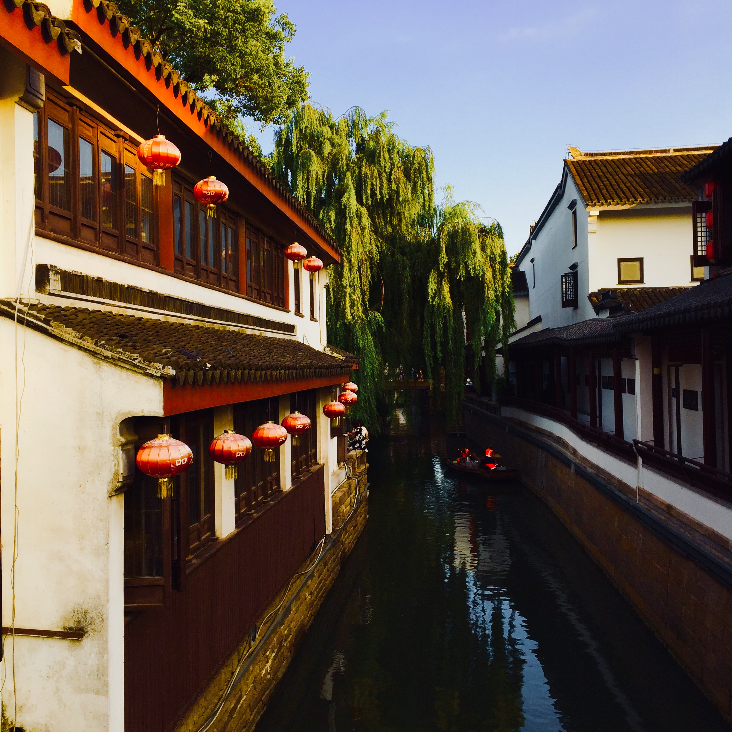 中文（中国大陆）: 平江路河景